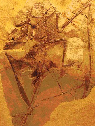 Fossil Sordes